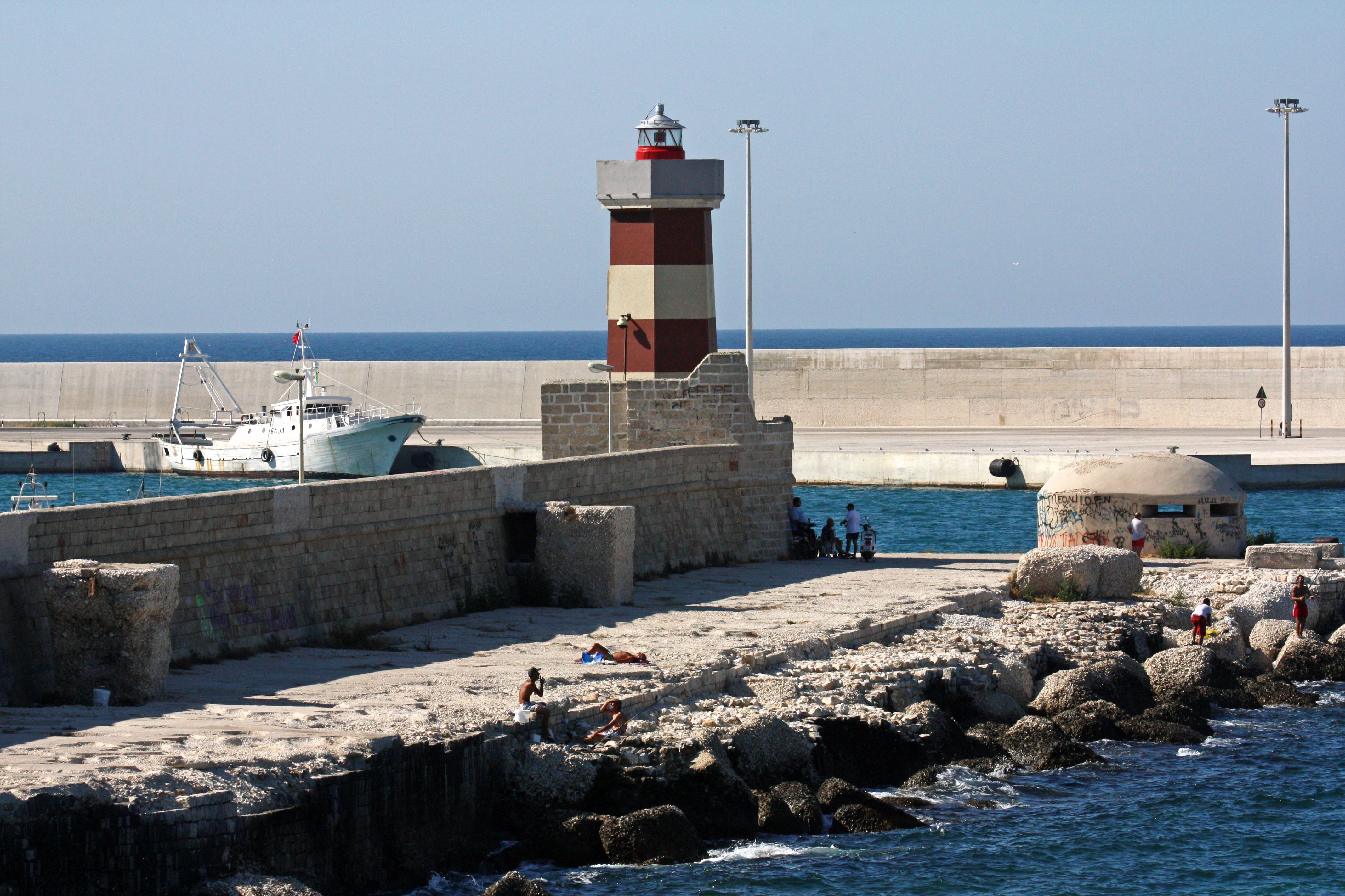 Monopoli: faro